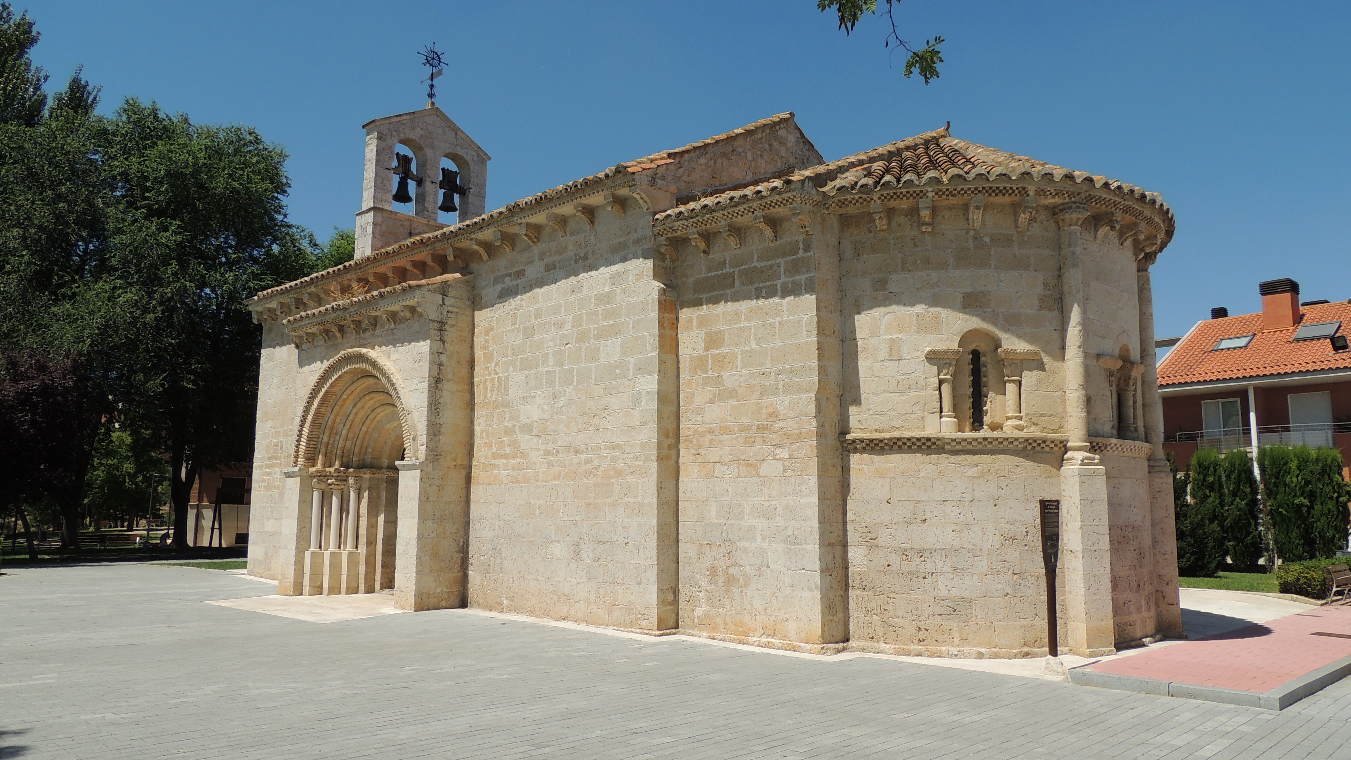 Exterior